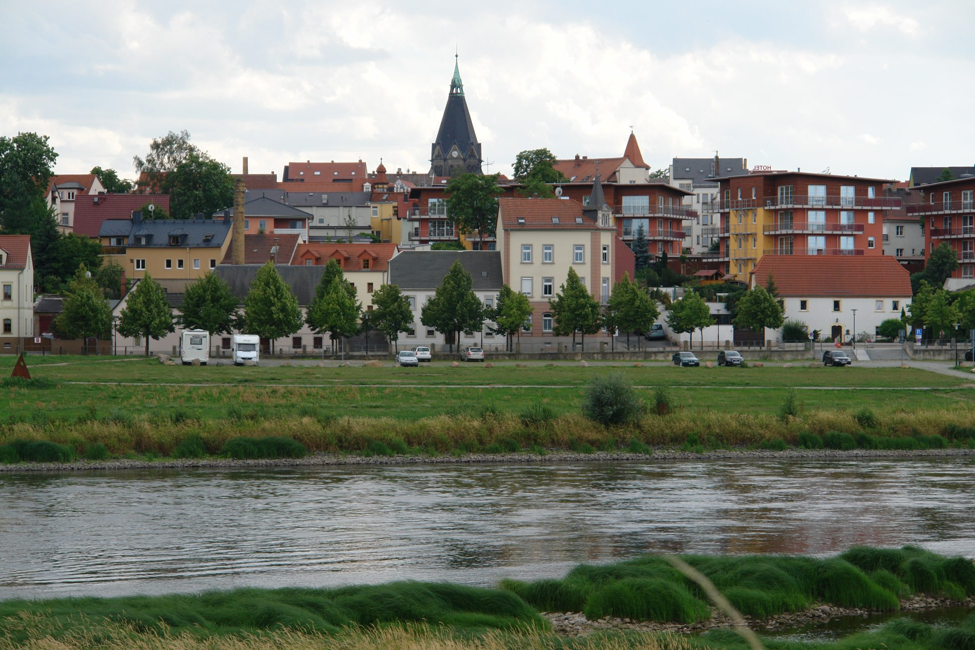 Riesa Blick zur markanten Trinitatiskirche